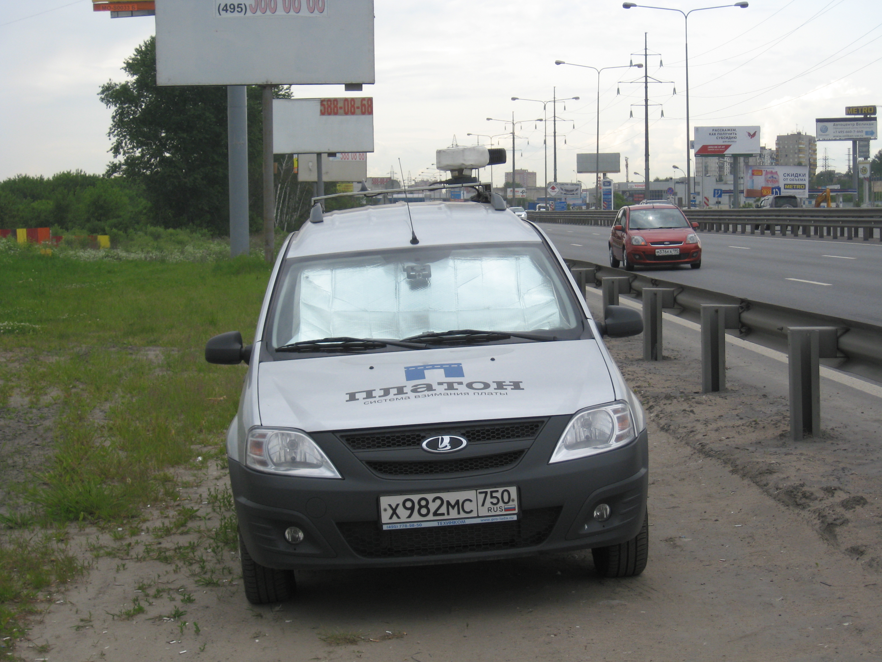 Система сбора денег с грузовиков Платон в действии.